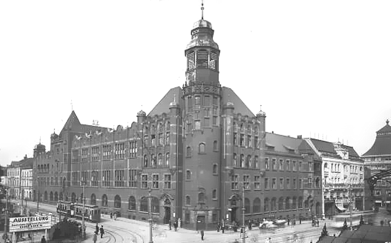 erstes Reichseigene Postgebäude der Stadt Essen